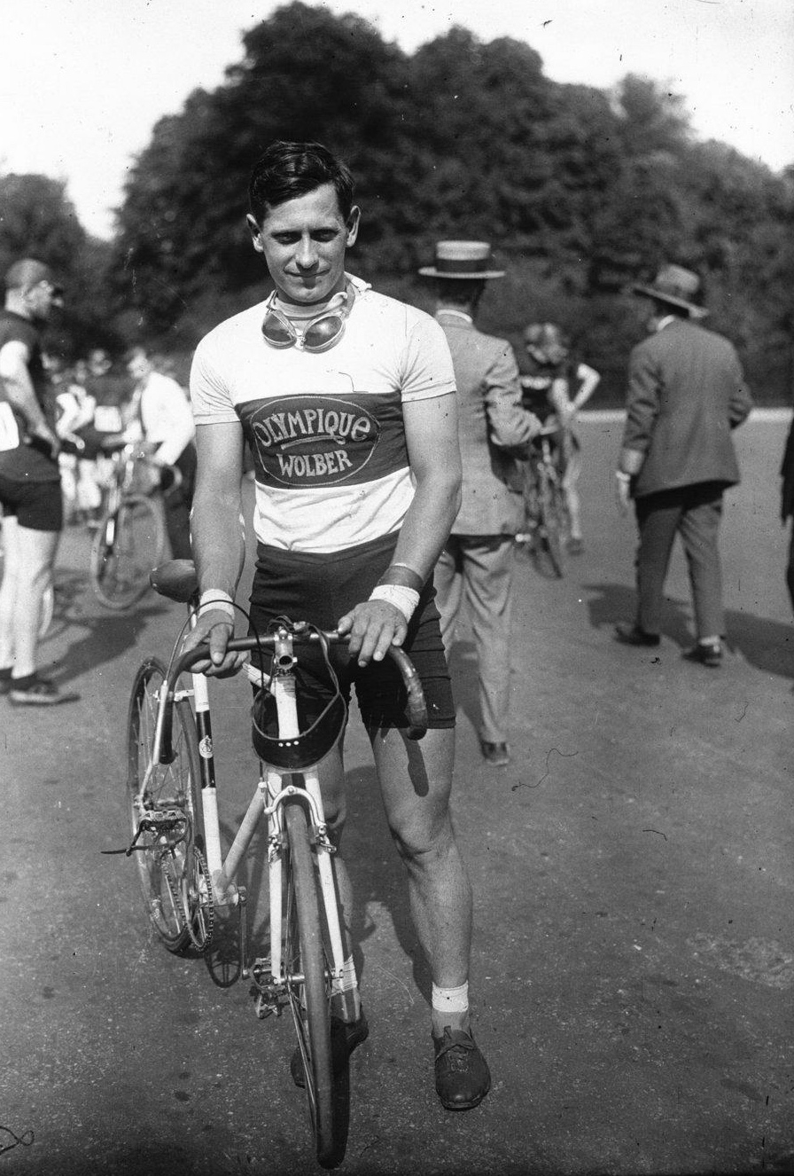 Heiri Suter lors du 7ème Critérium des As à Longchamp en 1926